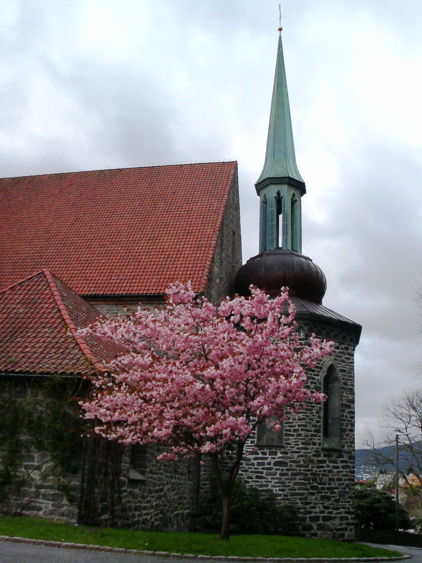 Storetveit kirke